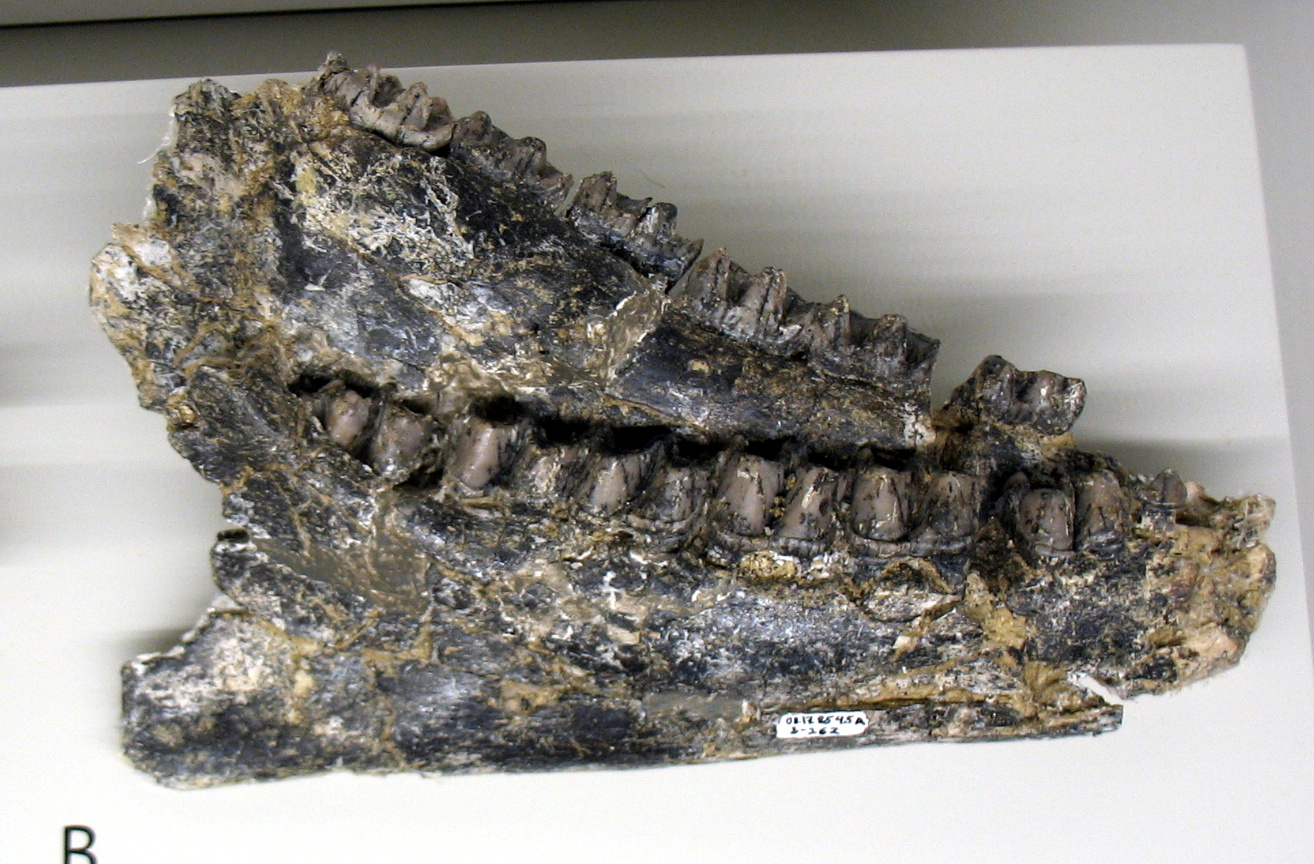 Mandíbula de Anchitherium sp. Yacimiento Carpetana (Madrid, España). Exposición temporal "La colina de los tigres dientes de sable. Los yacimientos miocenos del cerro de los Batallones (Torrejón de Velasco, Comunidad de Madrid)" en el Museo Arqueológico Regional (MAR), Alcalá de Henares (Madrid)